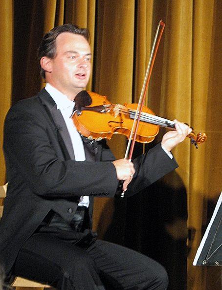 Grupa MoCarta